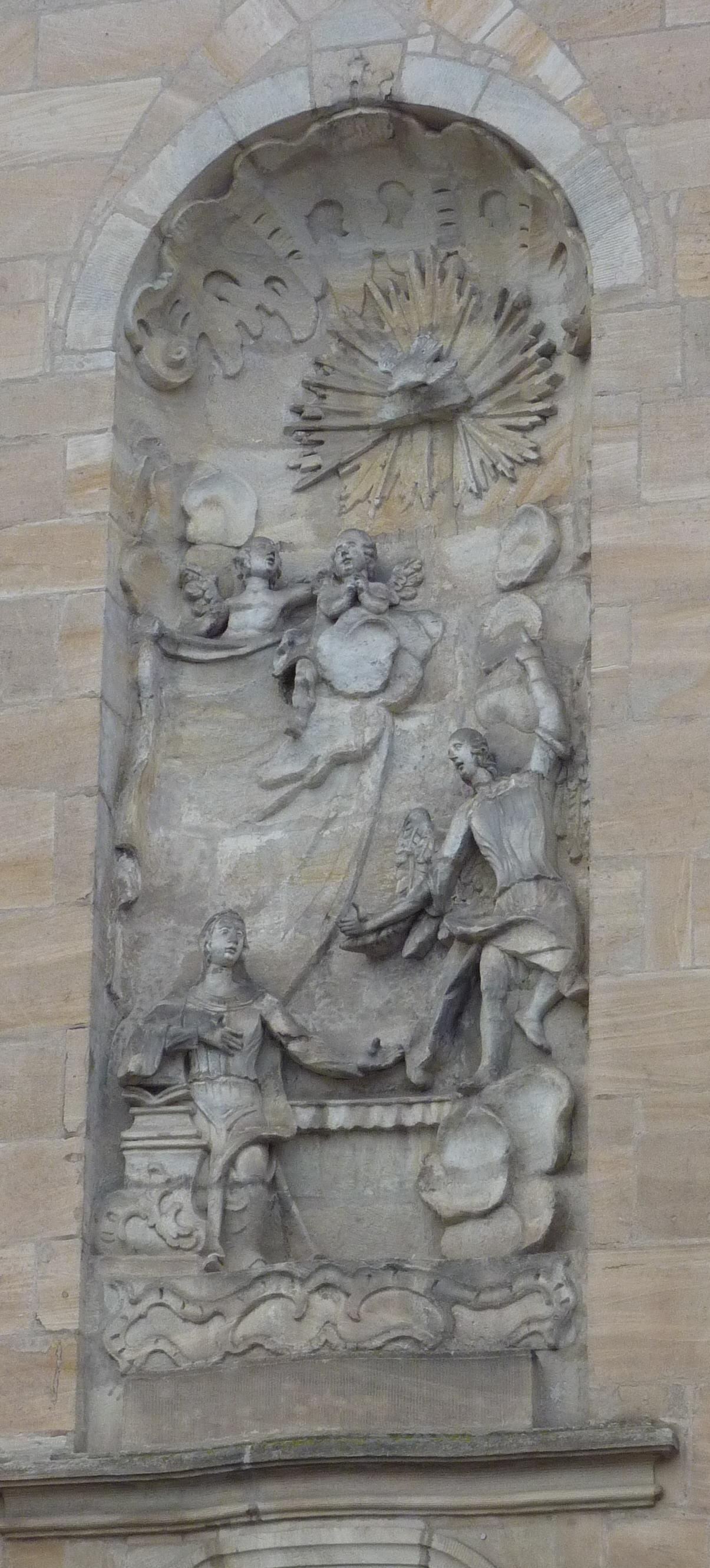 Relief an einer Kirche in Spalt